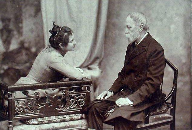 Jókai Mór és második felesége Nagy Bella. Erdélyi Mór fényképfelvétele (1900 körül)